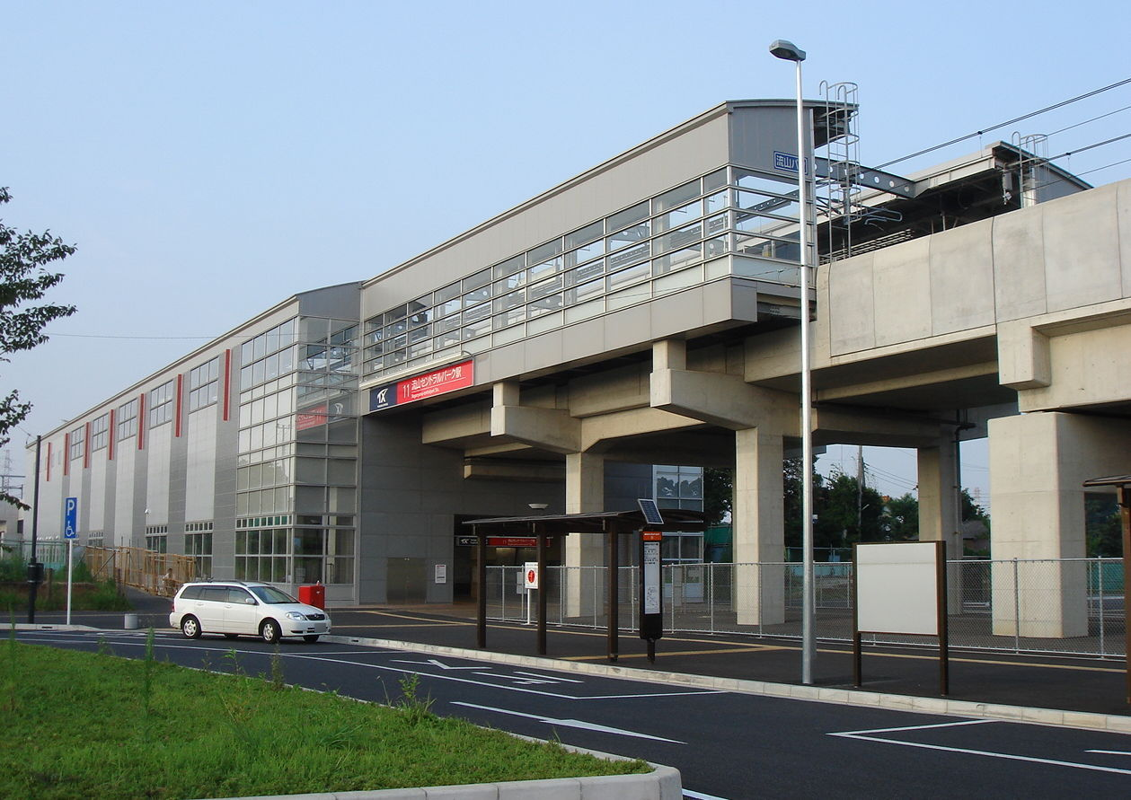 Tsukuba Express Line(つくばエクスプレス線) Nagareyama-centralpark Station (流山セントラルパーク駅駅舎)